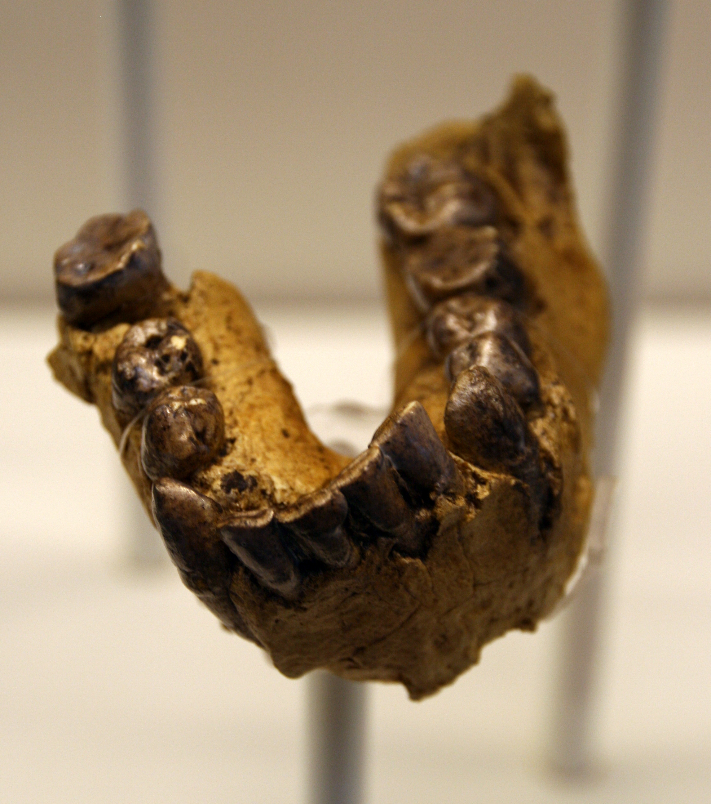 Parietales y mandíbula de Homo habilis, OH 7 o "Johnny's Child". Réplica. Holotipo de la especie. Posiblemente un varon de entre 10 y 12 años. Descubierto por John Leakey Original: FLK NN, Garganta de olduvai (Tanzania) 1,7 millones de años Museo Nacional de Dar Es Salaam (Tanzania) Réplica: Instituto de Evolución en África Exhibido en exposición temporal, "La cuna de la humanidad", en el Museo Arqueológico de Regional de Madrid